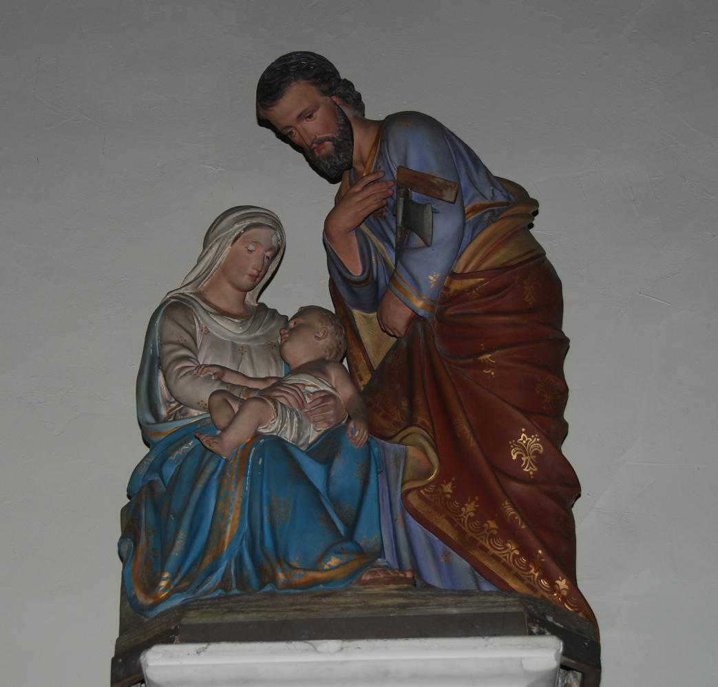 Limburgs: Beeld van de Heilige familie in de kèrk van Wellen (Belsj)